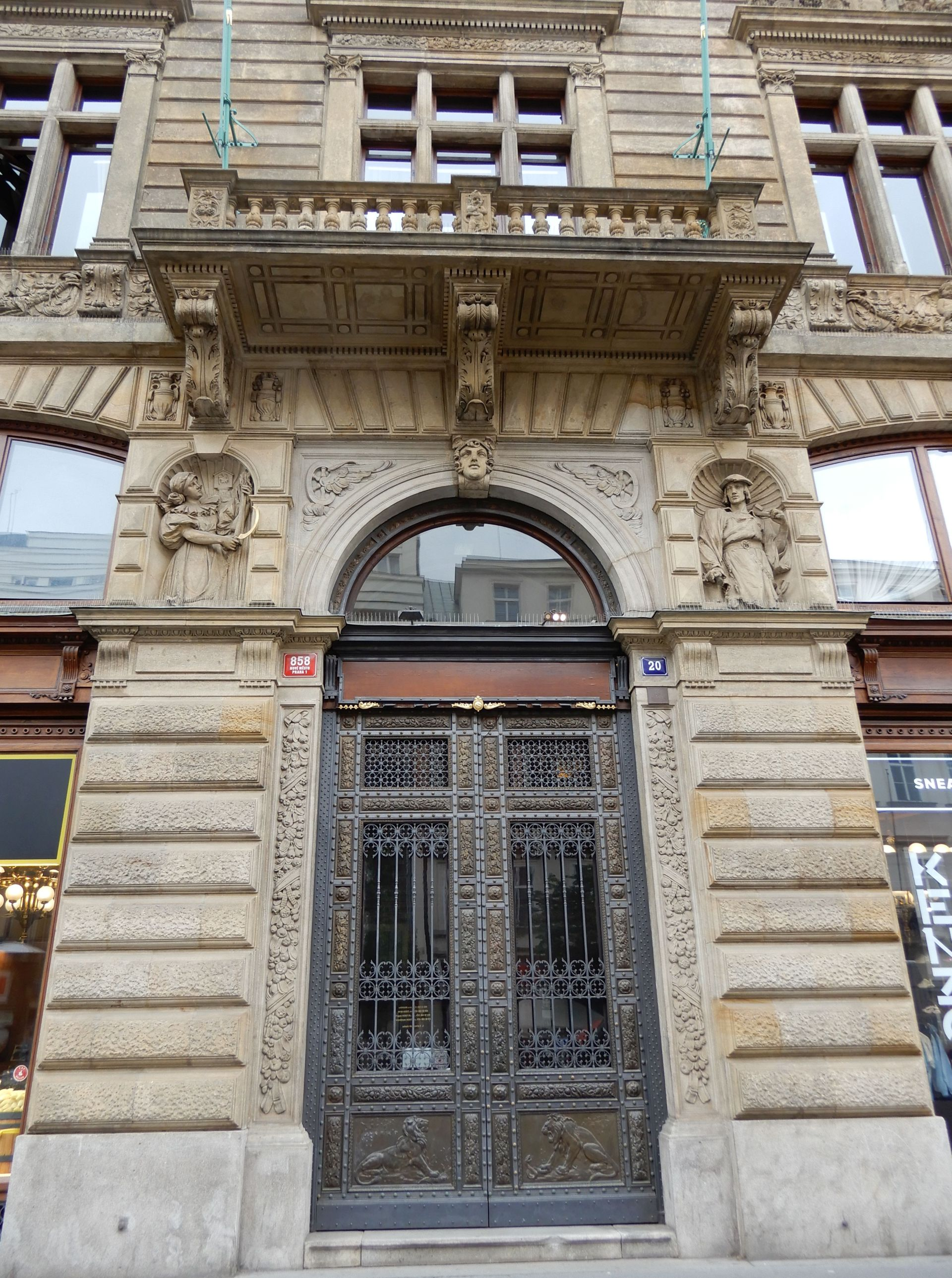 Palác čp.858-II, nároží Na Příkopě 20, roh Nekázanky, architekt Osvald Polívka 1896-1899